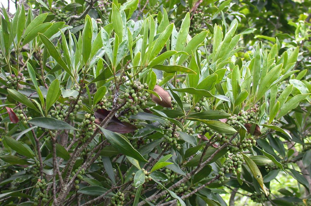 Mysine seguinii タイミンタチバナ 2004.06.20 和歌山県田辺市